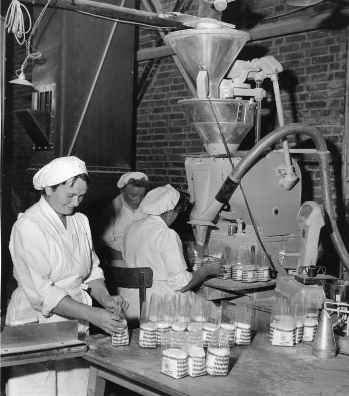 Zuckerfabrik Franken, Ochsenfurt Zuckerkleinpackungen